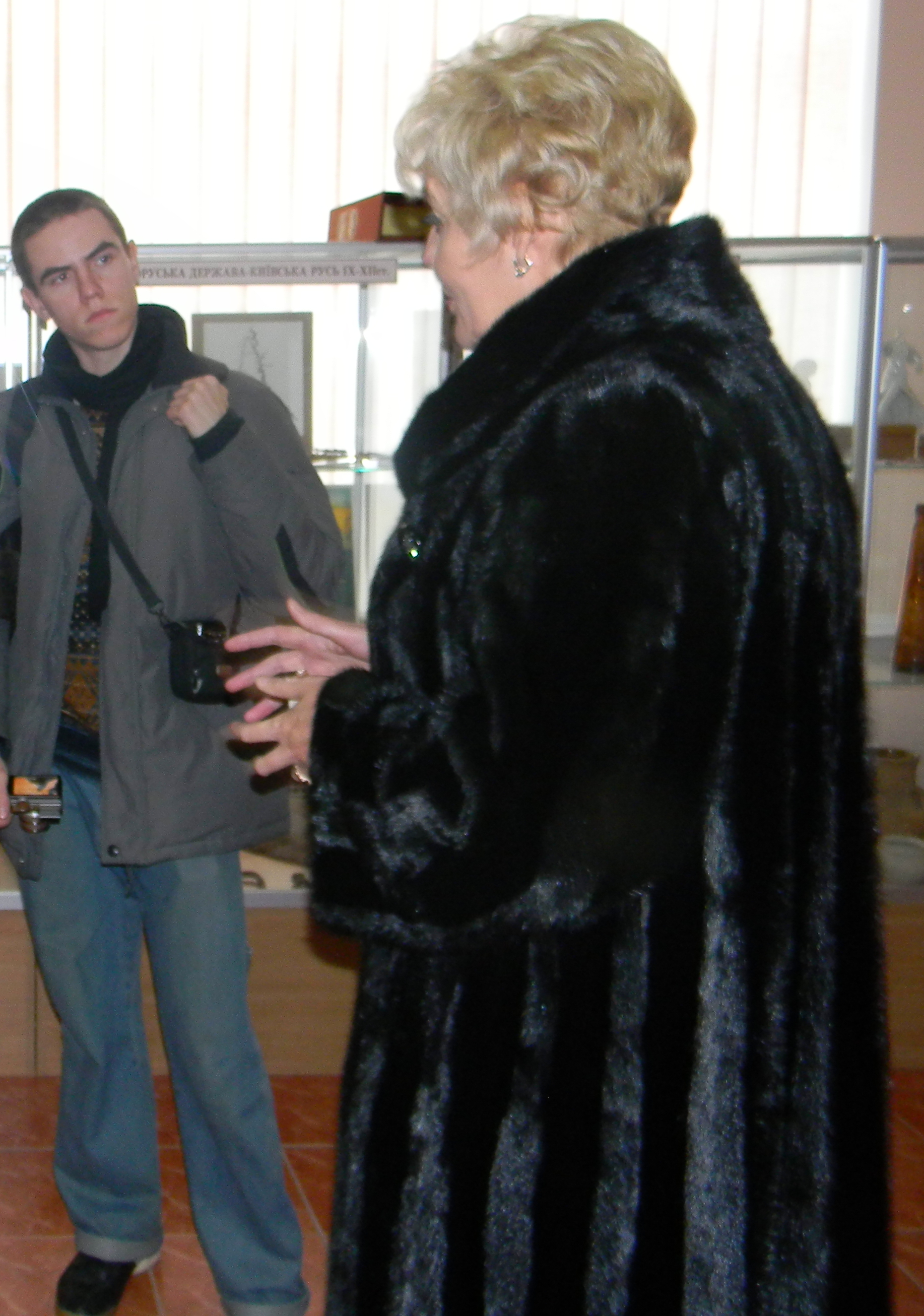 Учасники експедиції у Васильківському історико-краєзнавчому музеї